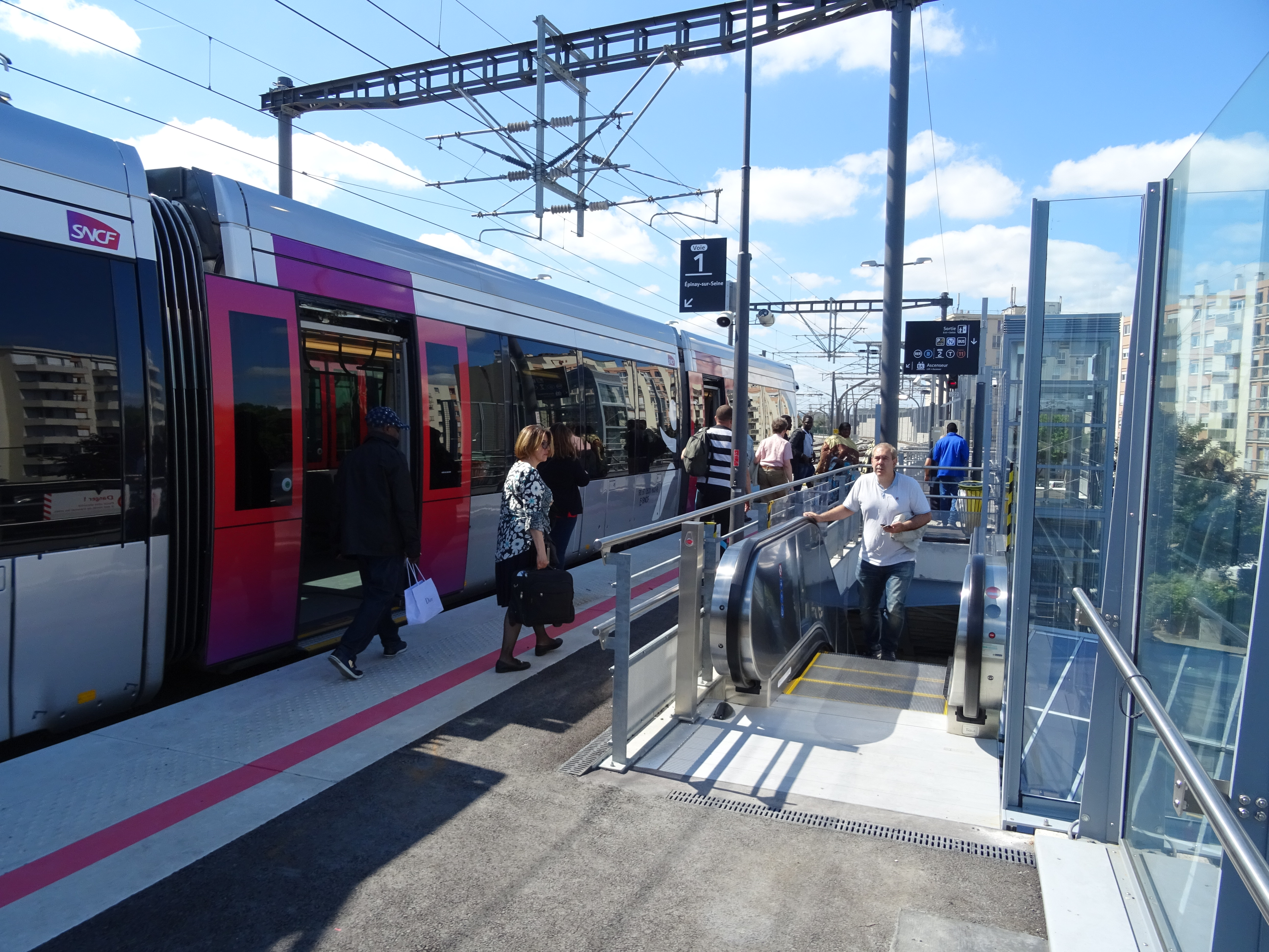 Citadis Dualis à quai au Bourget